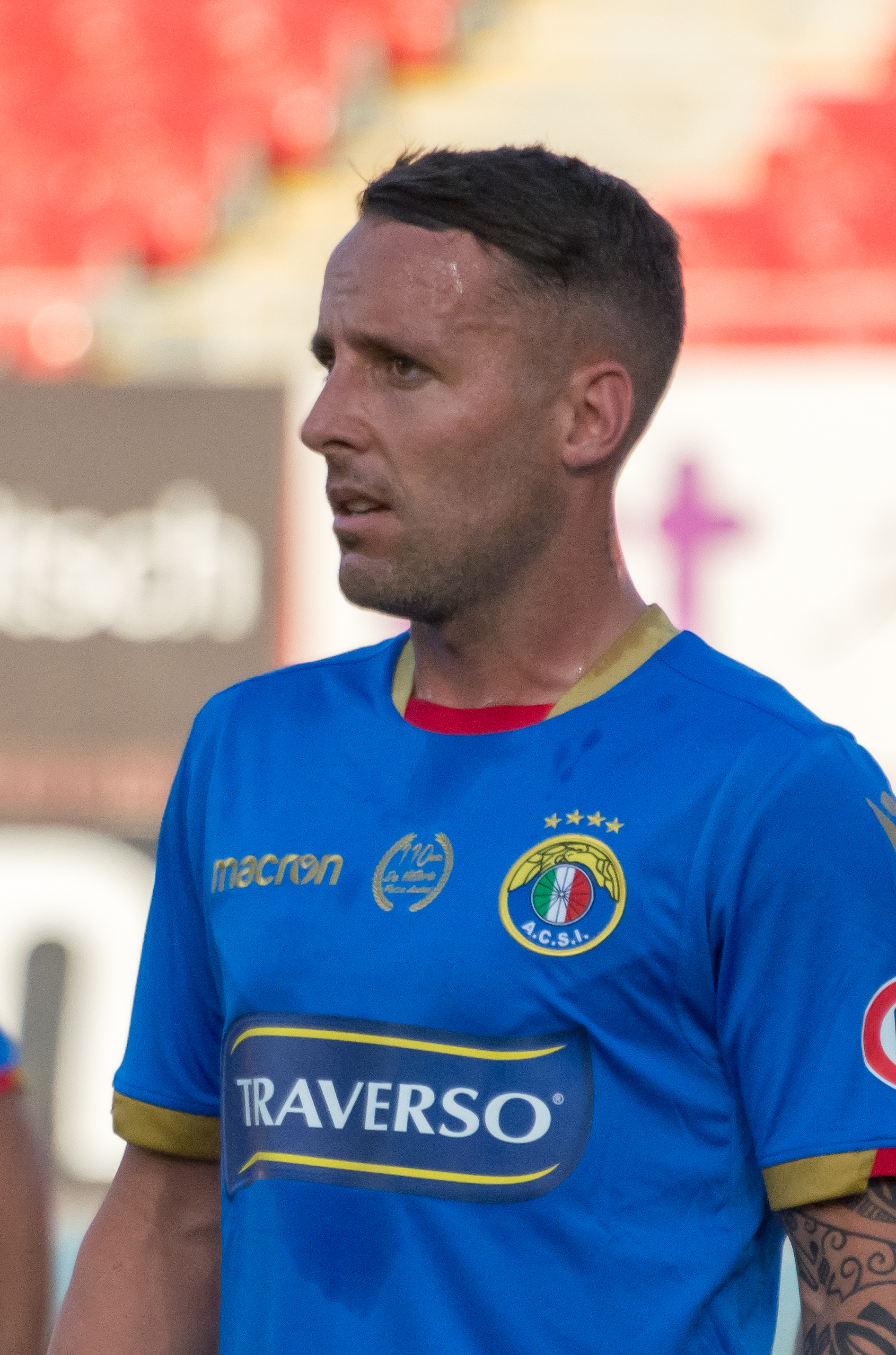 Audax Italiano v Colo-Colo, Estadio Nacional, Ñuñoa, Santiago, Región Metropolitana, Chile